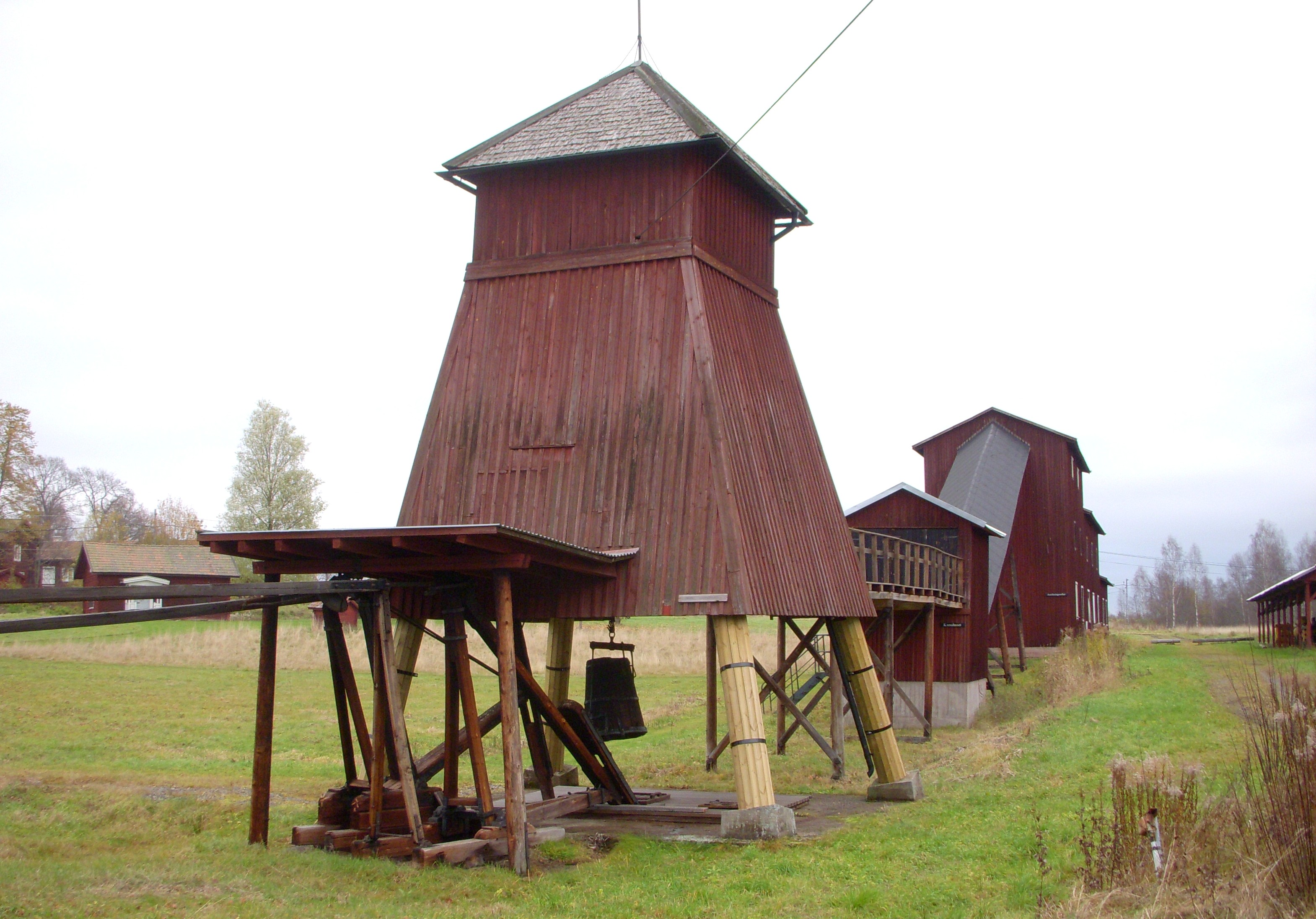 Ludvika Gammelgård, uppfordringstorn, sovrings- och anrikningsverk